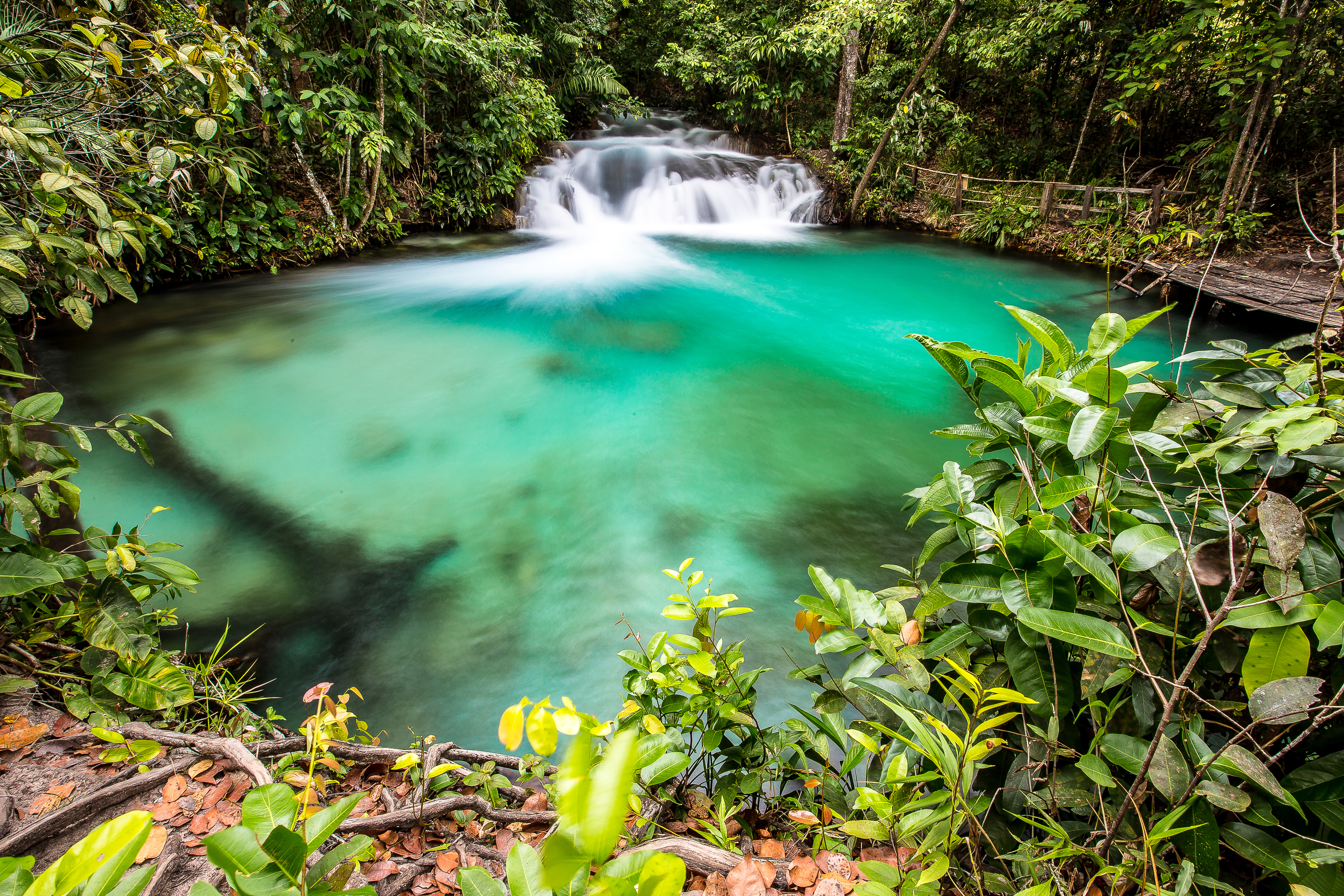 Primeira queda do Rio Formiga, uma piscina natural perfeita para mergulhar.